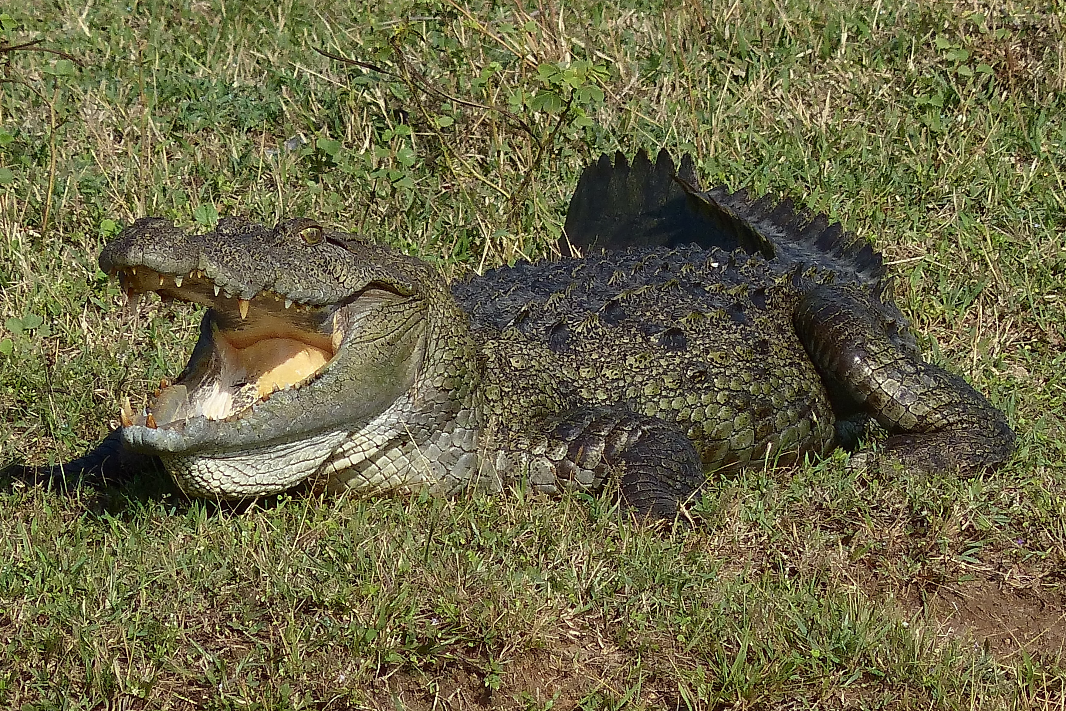 Krokodil im Yala Nationalpark, Sri Lanka